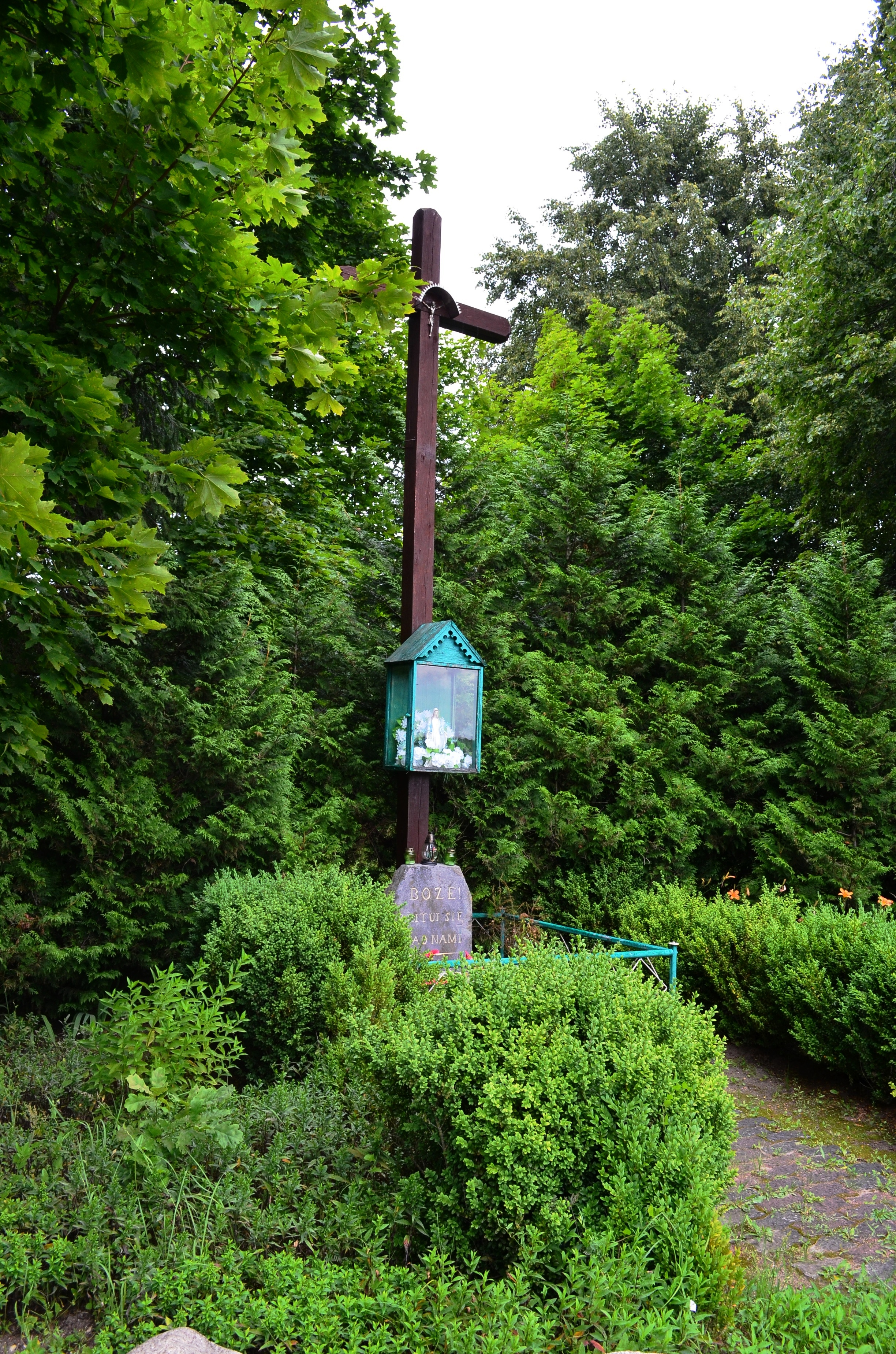 Glitiškių kryžius, Vilniaus r.